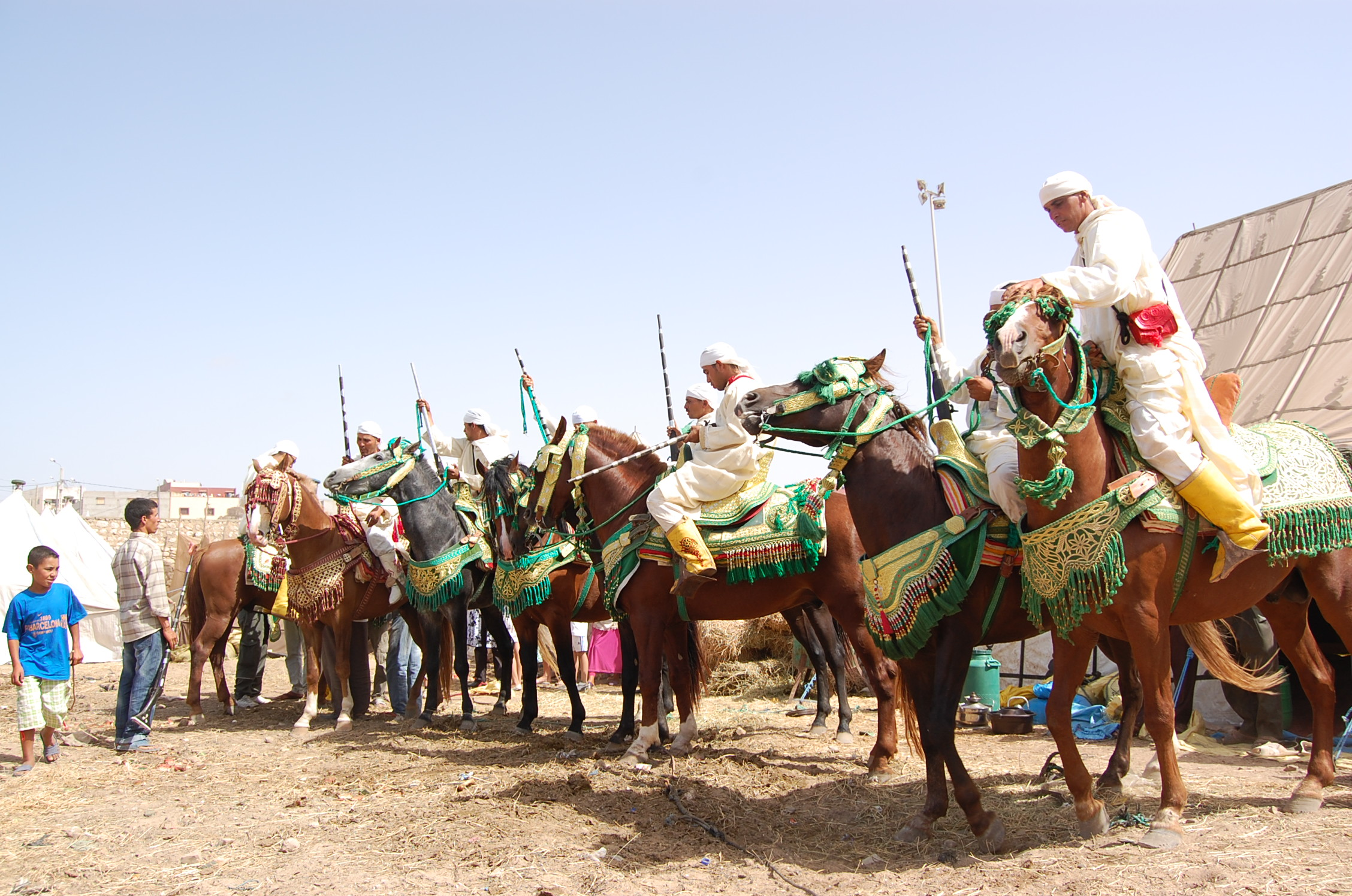 Walon: Fantazia Moulay Abdellah : aprestaedje des cavlîs